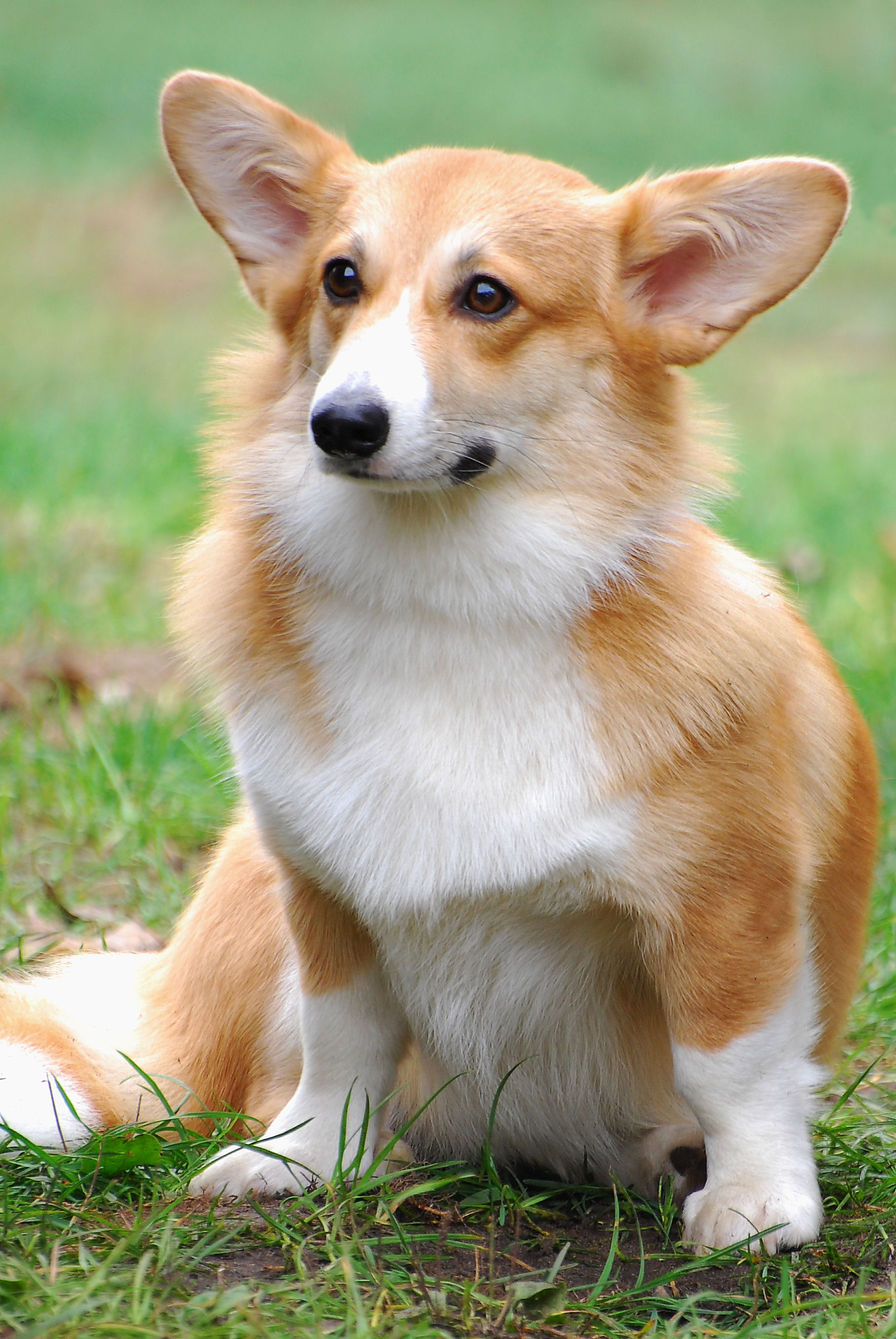 Welsh Corgi Pembroke in Kamień